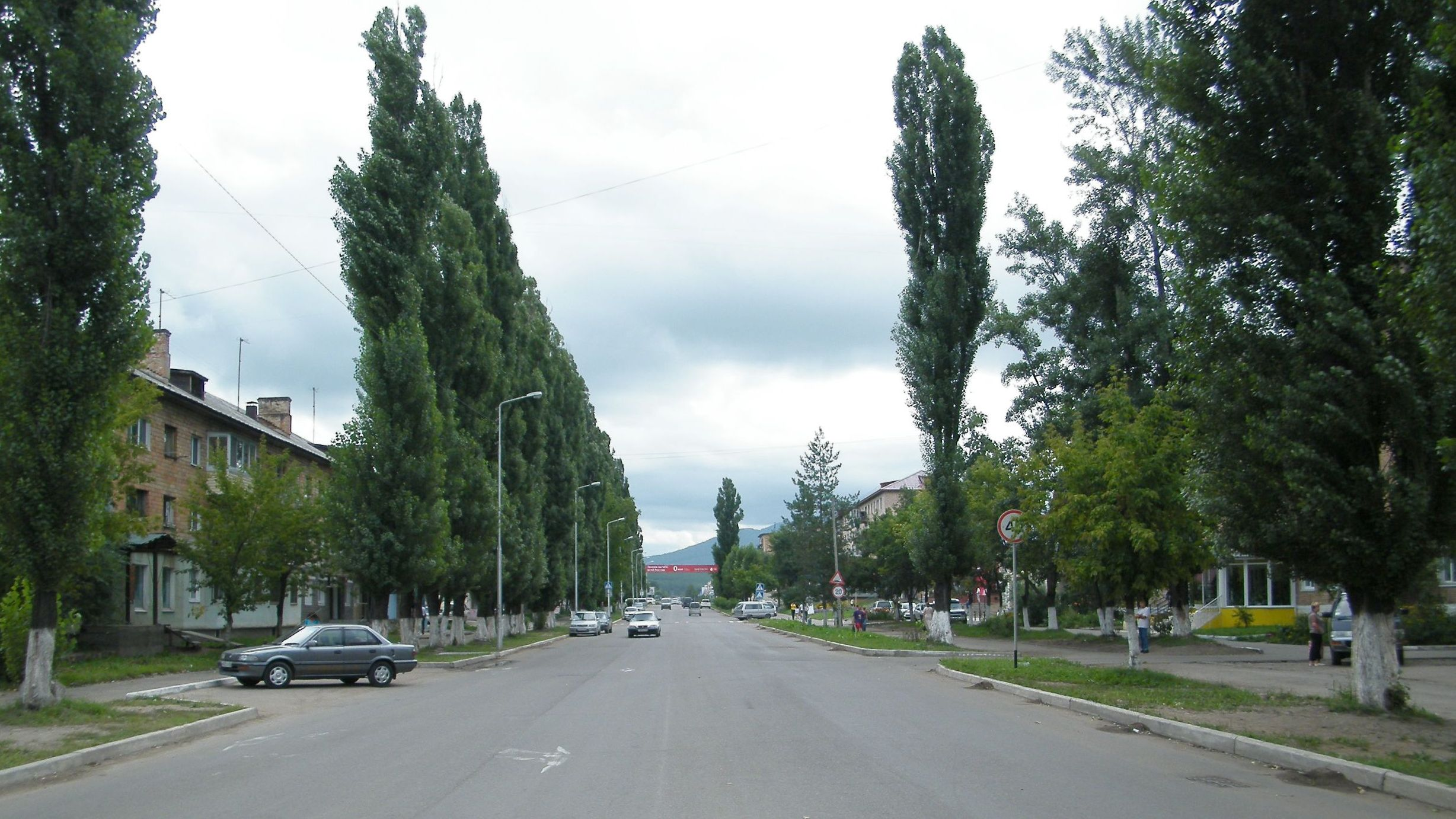 Город Арсеньев, Приморье.